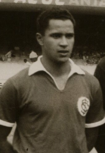 Oreco.